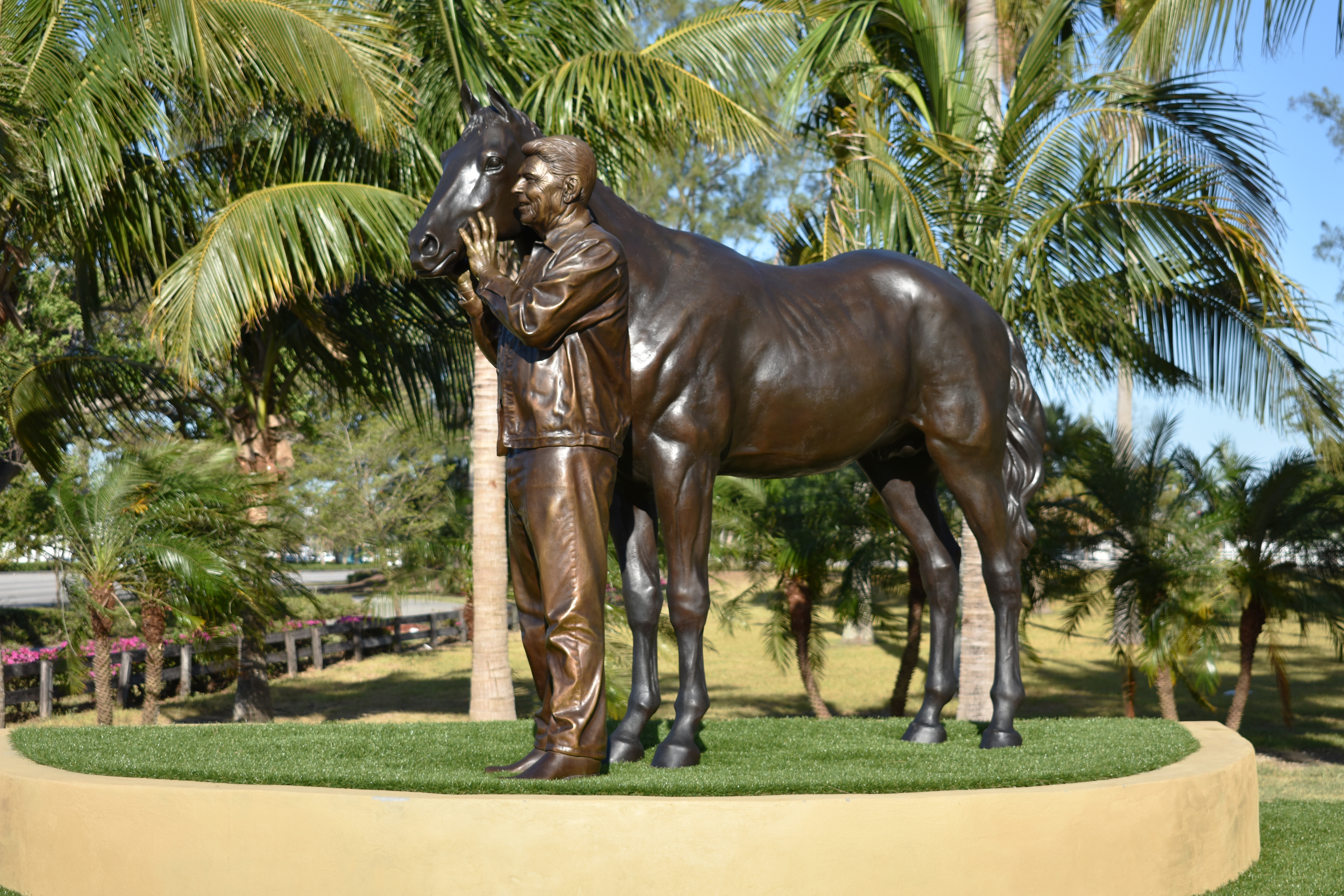 Ronald Reagan Equestrian Monument, Miami, Florida. This sculpture is a product of the Miami-Dade County, Art in Public Places program. Unveiled in April 2018, at Tropical Park, this monument is an important public artwork by artist Carlos Enrique Prado.